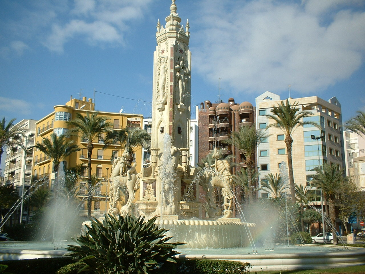 Plaza de Luceros, en Alicante, España.